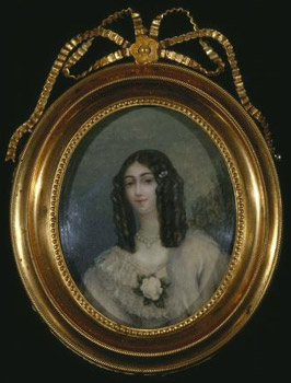 Obrázek Marie Duplessis, dámy s kaméliemi